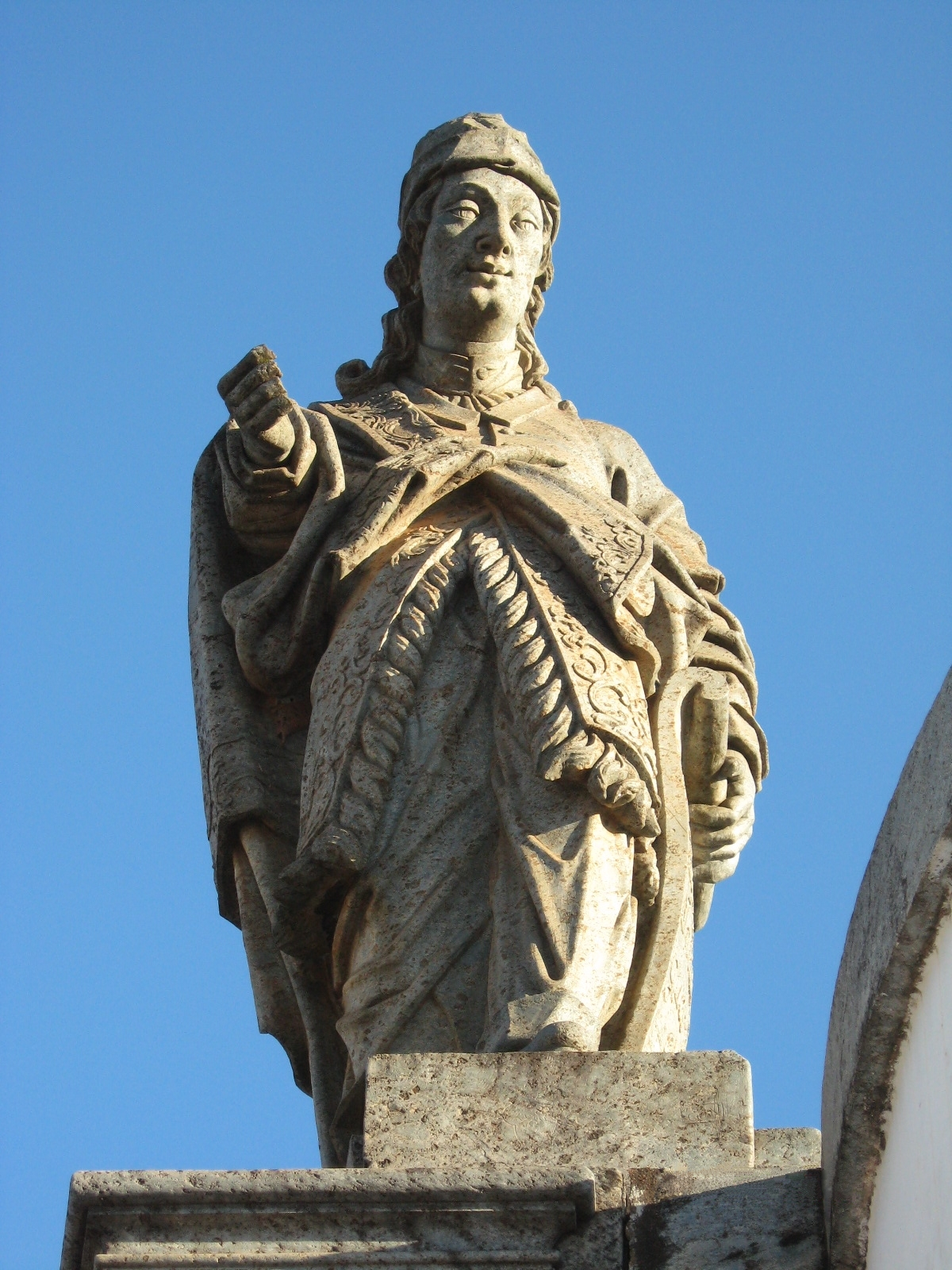 Profeta Amos - Doze profetas de Aleijadinho Congonhas Minas Gerais